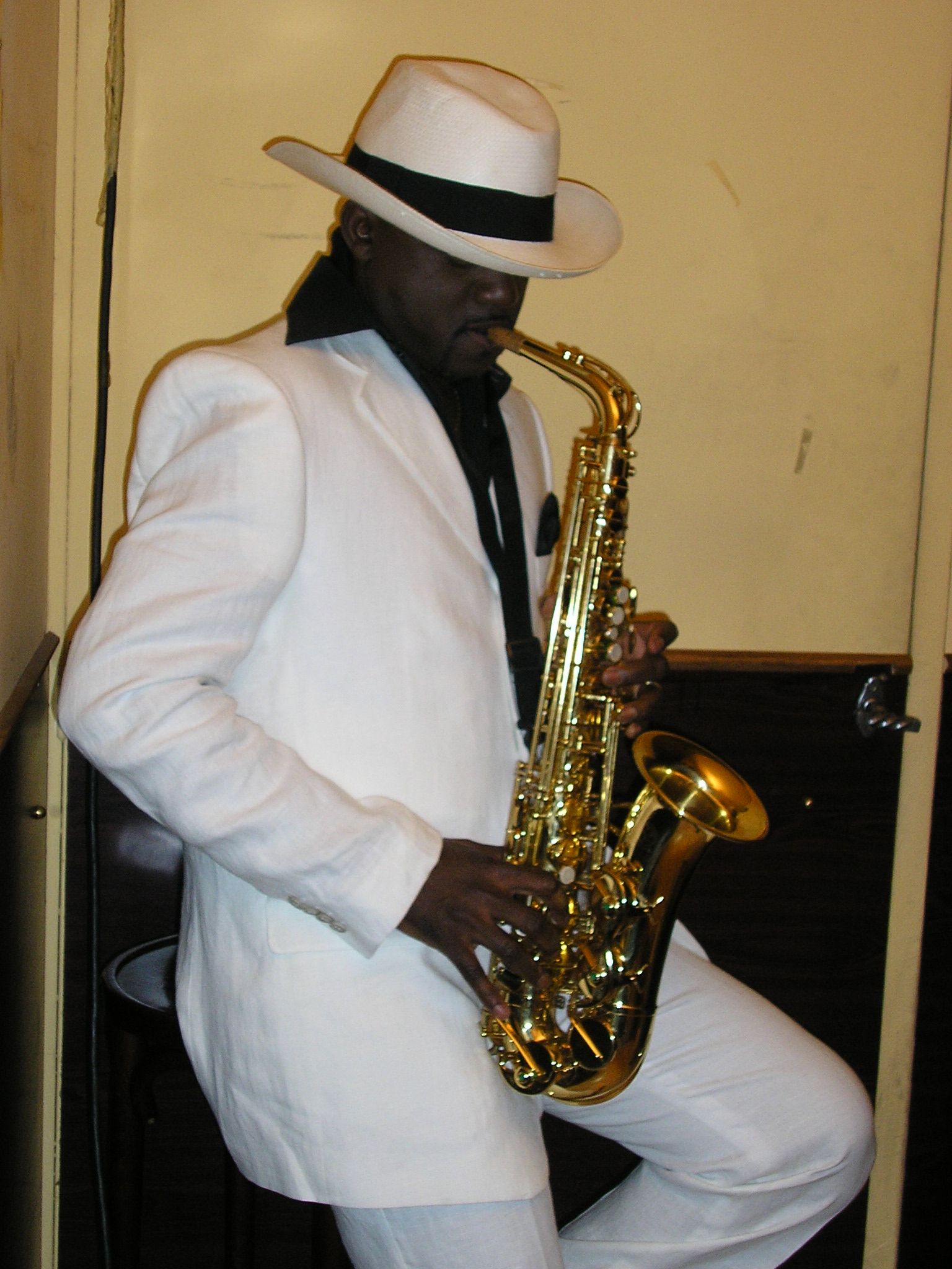 Le saxophoniste originaire du Congo Brazzaville Sam Talanis